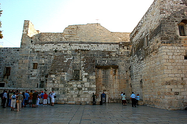 Betleje, fasada Bazyliki Narodzenia Pańskiego